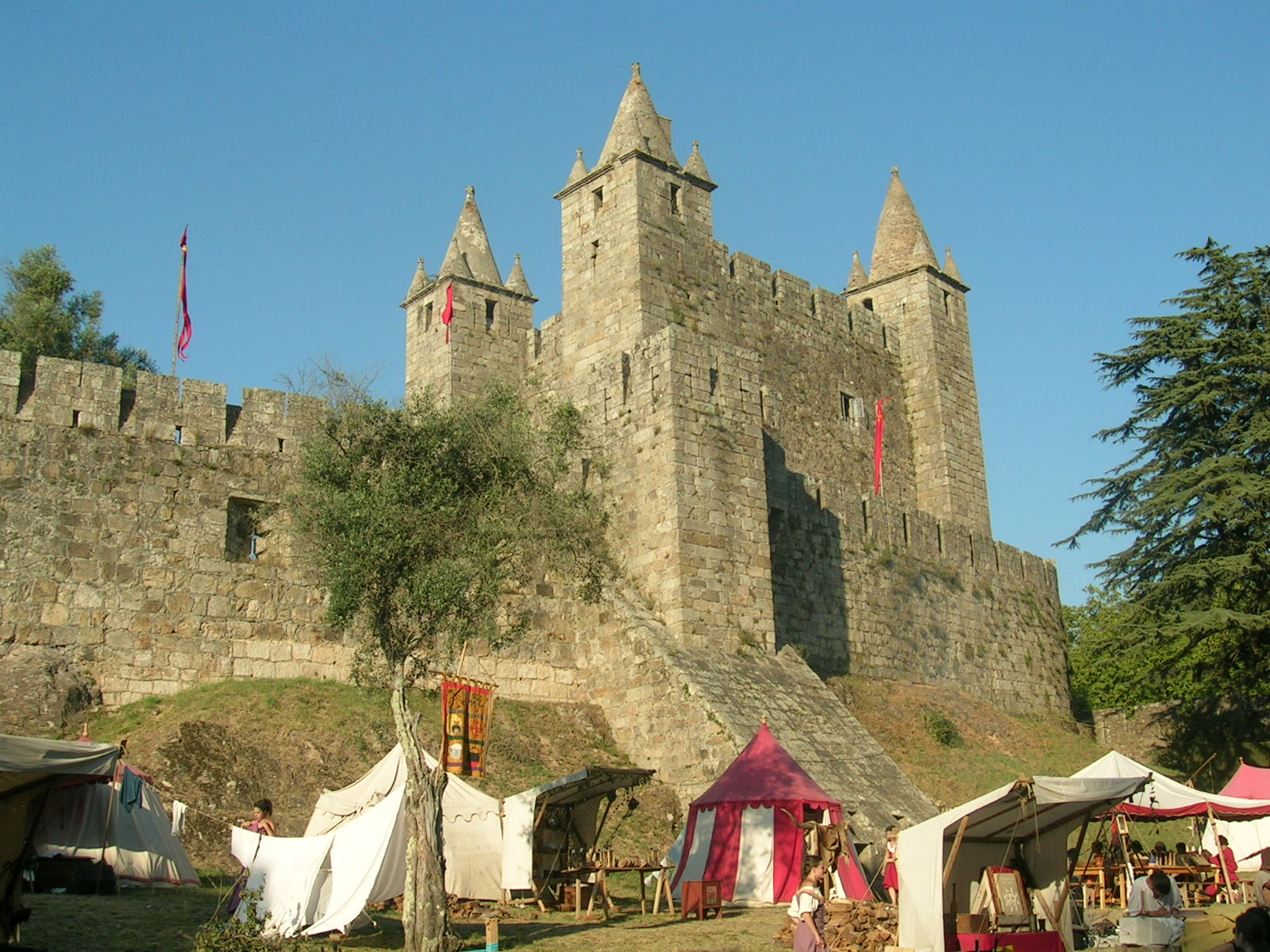 Castelo de Santa Maria da Feira, remonta a forte Romano. Este edificio de categoria militar medieval é uma das melhores amostrar da arquitectura militar em todos os periodos da Idadea Média portuguesa.